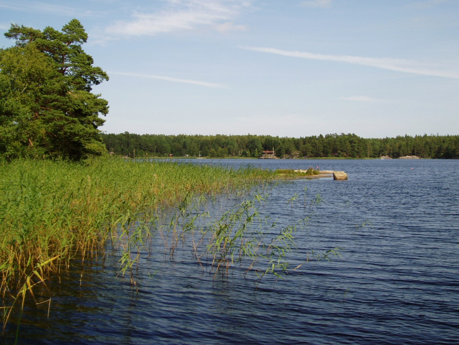 Drängsjön, Österåker kommun